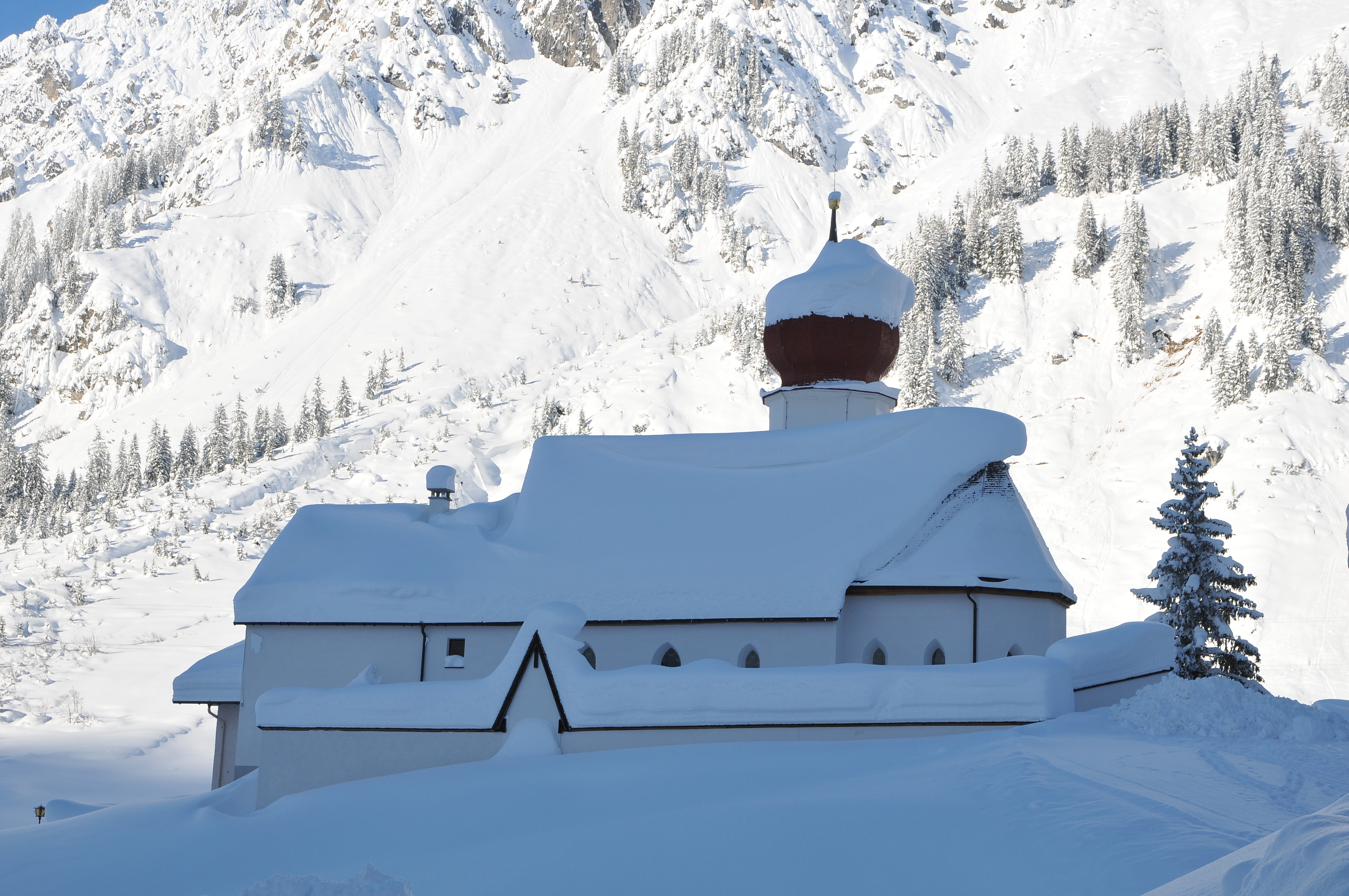 Kath. Pfarrkirche Unserer Lieben Frau Mariä Geburt mit Friedhof in Stuben 24, Klösterle.